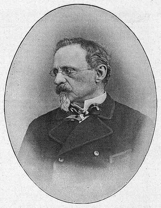 Retrato de Federico Madrazo, en la revista española La Ilustración Artística.